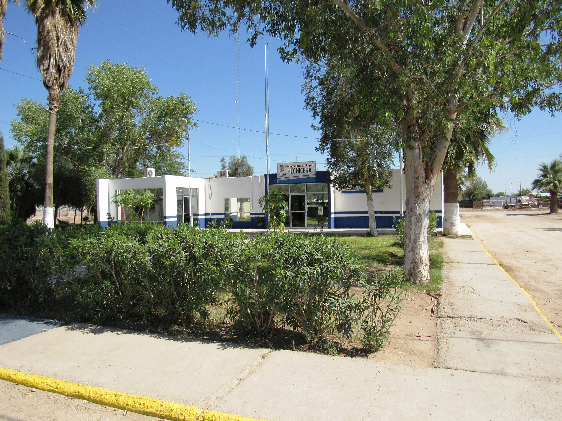 Esta es la delegación y estación de policía de Hechicera, dentro de su jurisdicción se encuetra no sólo el ejido Querétaro sino varios ejidos poblados y localidades del valle de Mexicali